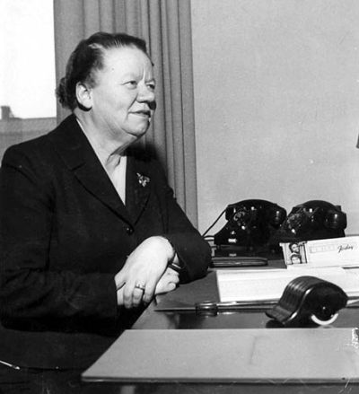 Tyyne Leivo-Larsson